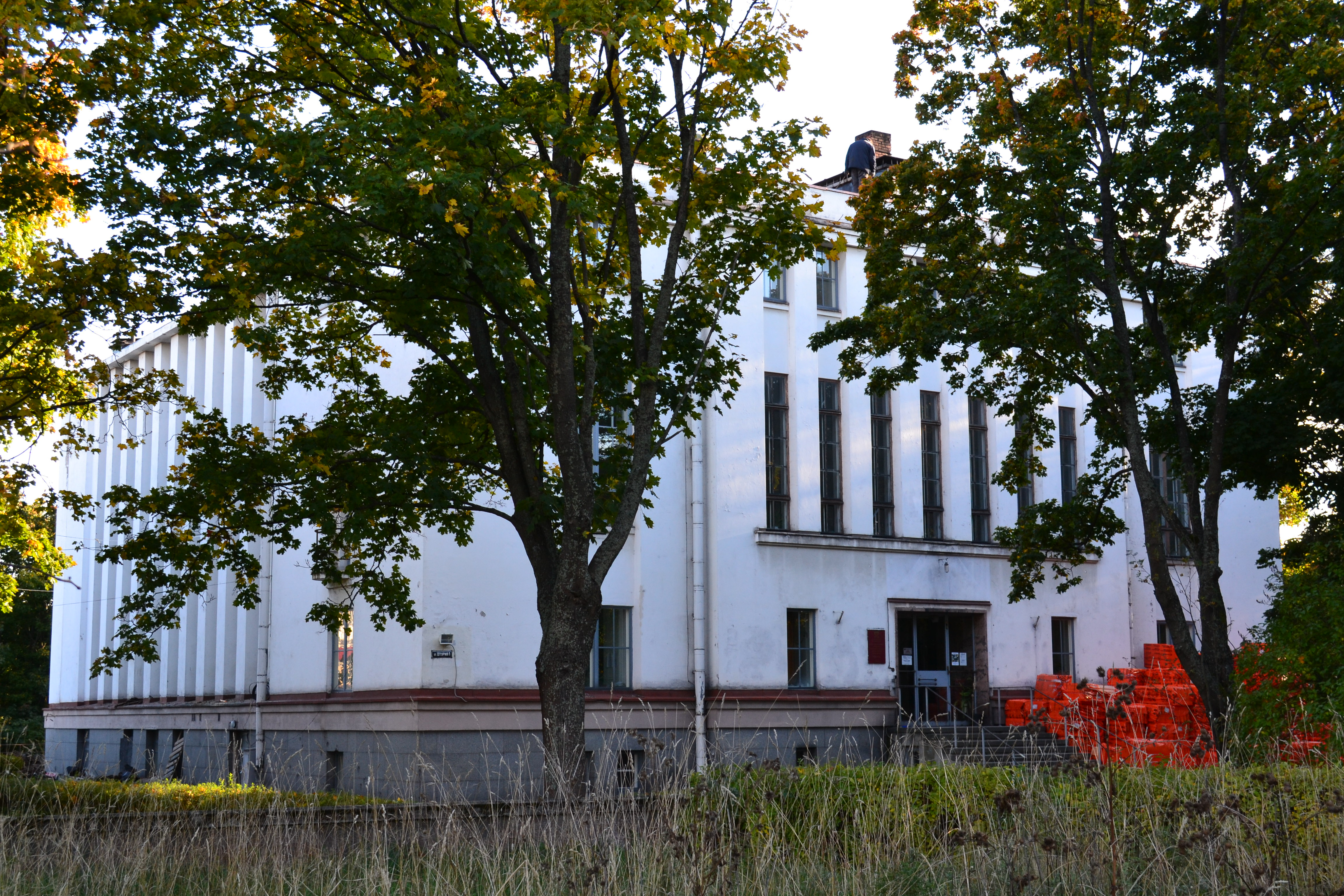 Здание архива (Санкт-Петербург и Лен.область, Выборг, штурма улица, 1)